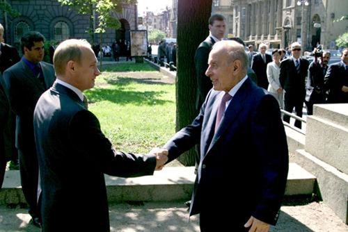 Встреча с Президентом Азербайджана Гейдаром Алиевым перед началом церемонии открытия памятника поэту Низами Гянджеви